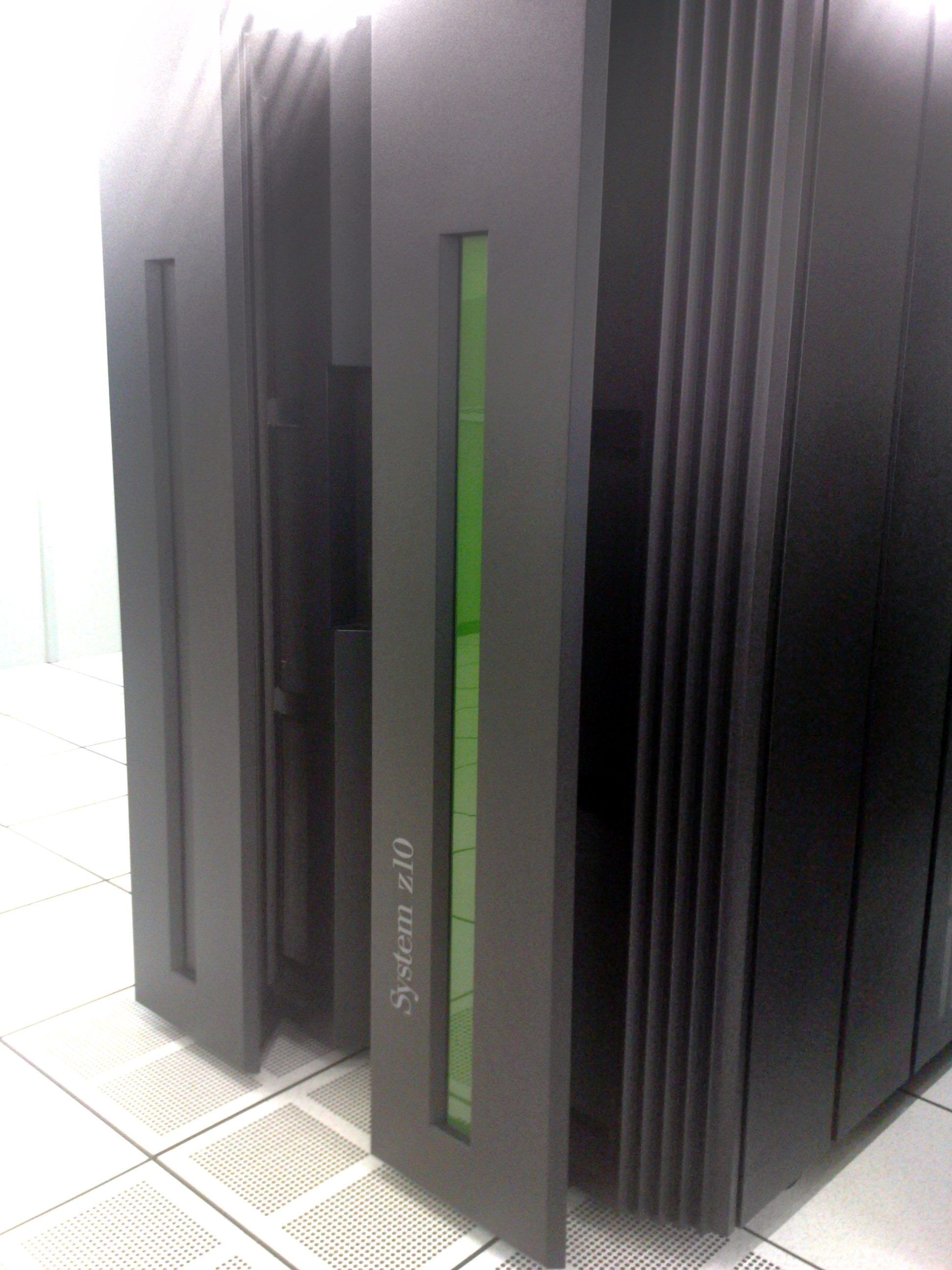 IBM Z10. Gigante mesmo.